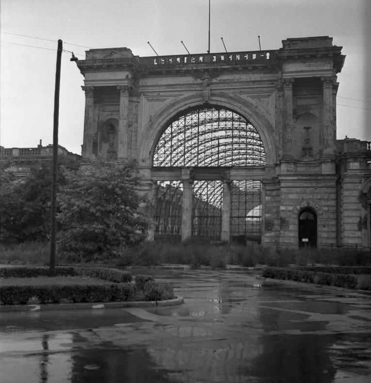 Stadtaufnahmen Berlin, Lehrter Bahnhof Information added by Wikimedia users.